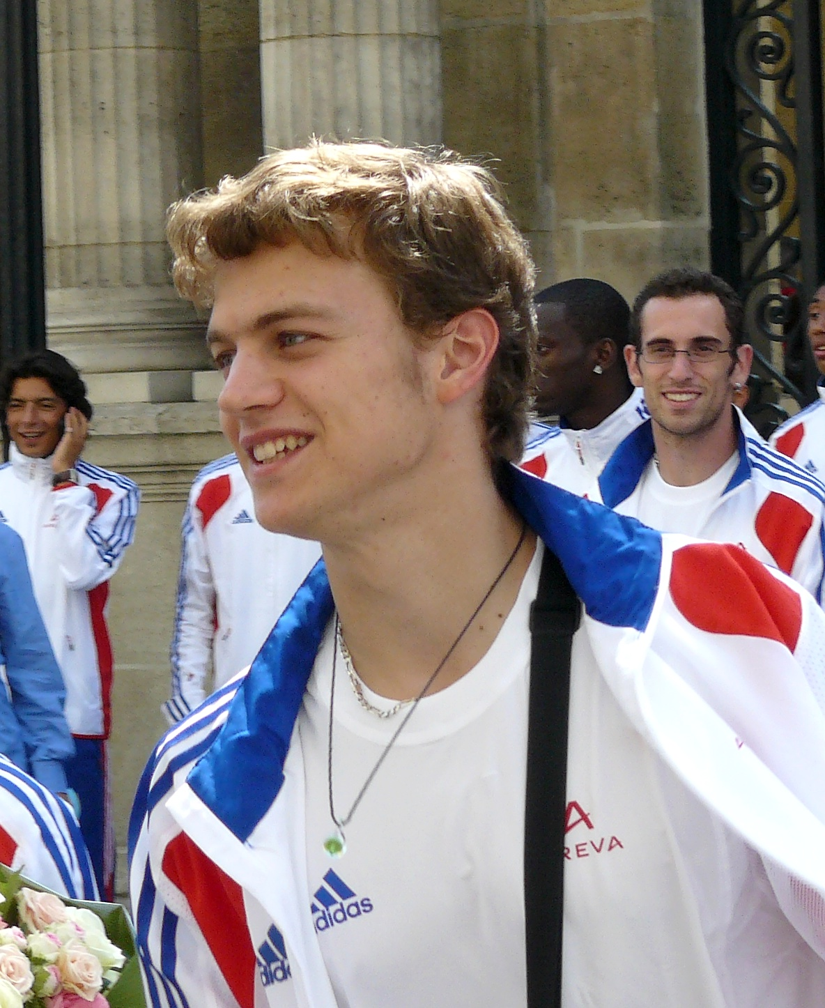 Christophe Lemaitre, athlète français (sprint), lors de la réception à l'Élysée des médaillés de Barcelone , le 3 août 2010.